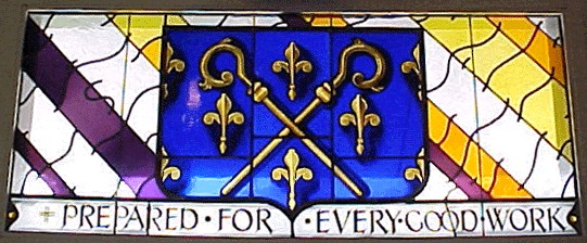 Vitrall amb l'escut heràldic de l'Orde dels Premonstratencs (O. Praem.), a l'abadia de Saint Michael d'Orange (Califòrnia)